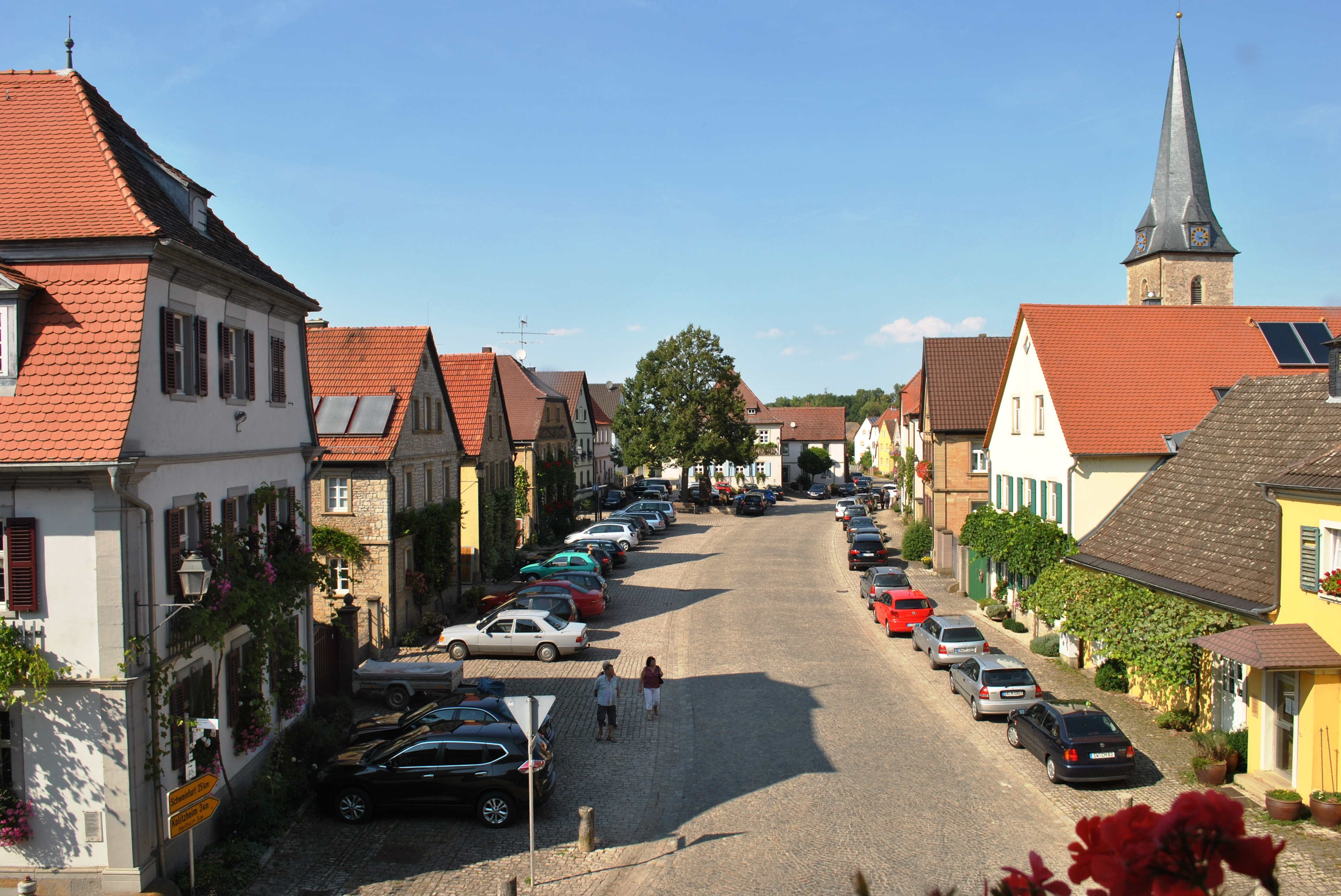 Der langgestreckte Marktplatz ist zugleich Dorf- und Schlossvorplatz. Er ist auf die Mittelachse des Schlosses ausgerichtet und wird an den Langseiten von Bauernhäusern des 19. Jahrhunderts in Giebelstellung begleitet. Nach Norden schließt ihn das ehemalige Rathaus ab. Der an der Nordostseite des Platzes liegende Kirchenbezirk ist in das Ensemble einbezogen.This is a photograph of an architectural monument.